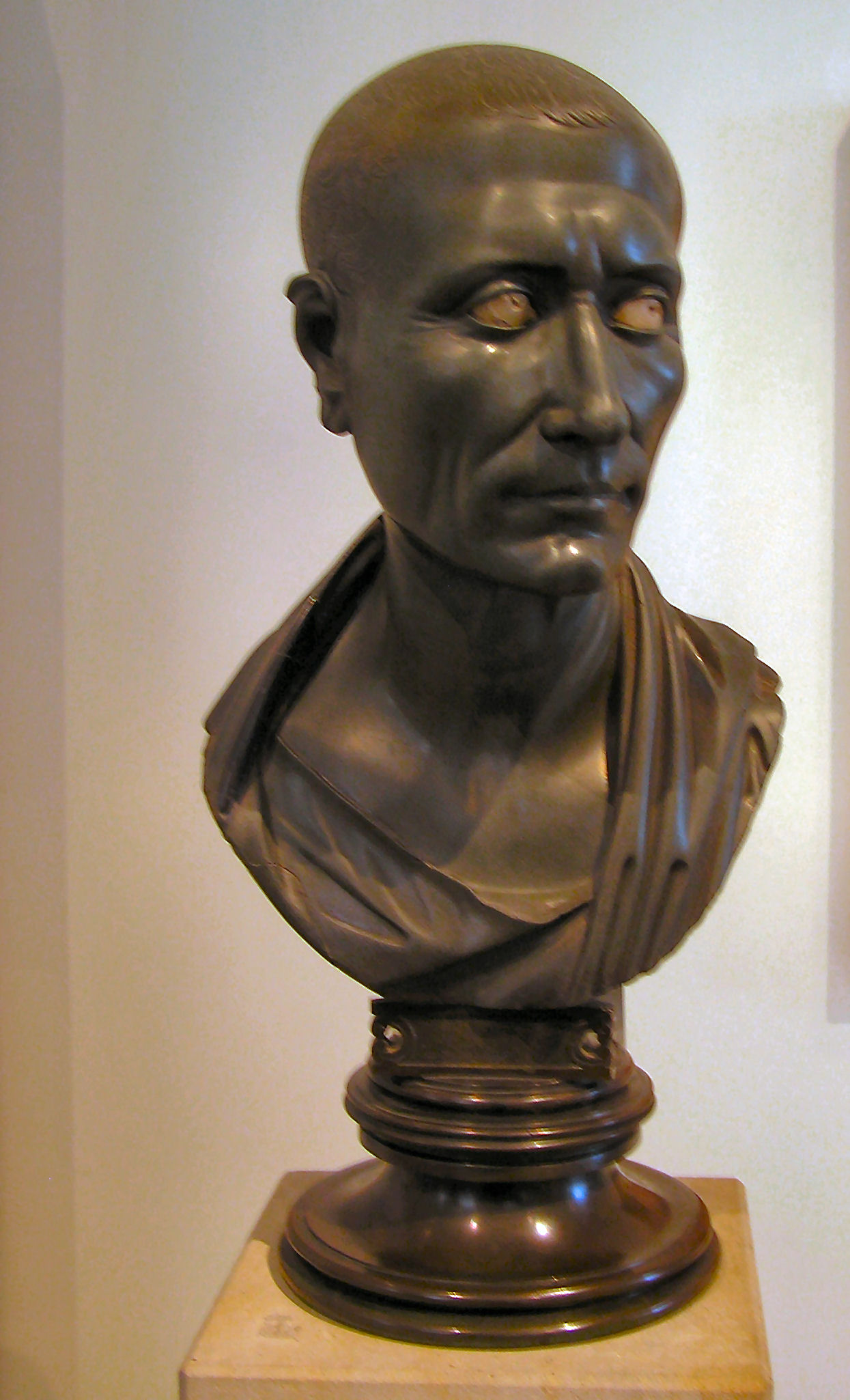 (Berlin, Altes Museum): Gaius Julius Caesar. 1st century AC.